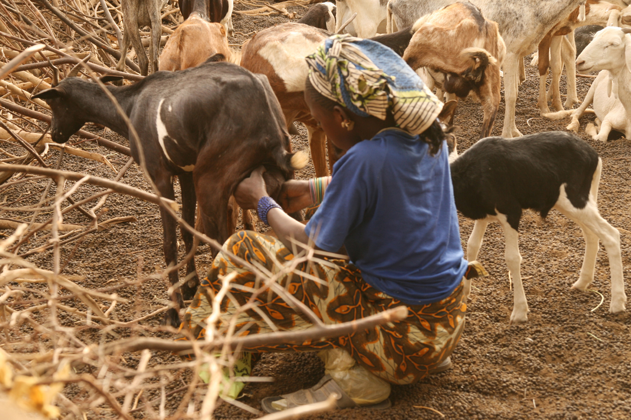 Traite de chevres dans un village Peuls de Dagana